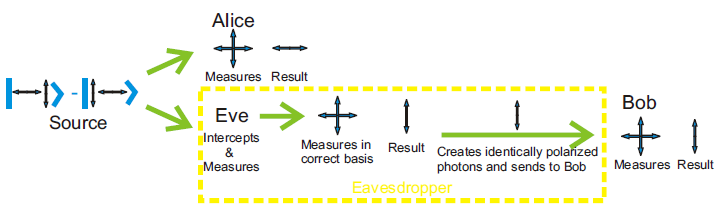 Простая атака с перехватом посылки. Ева перехватывает каждый фотон, предназначенный для Боба, случайным образом выбирает базис для измерения, получает результат и отправляет идентичный фотон Бобу. Измерение Евы разрушает суперпозицию состояние и разрушает квантовую когерентность, ответственную за идеальные антикорреляции в любом базисе. Конечным результатом является повышенная частота ошибок, которую Алиса и Боб могут обнаружить и тем самым определить, что их ключ небезопасен.